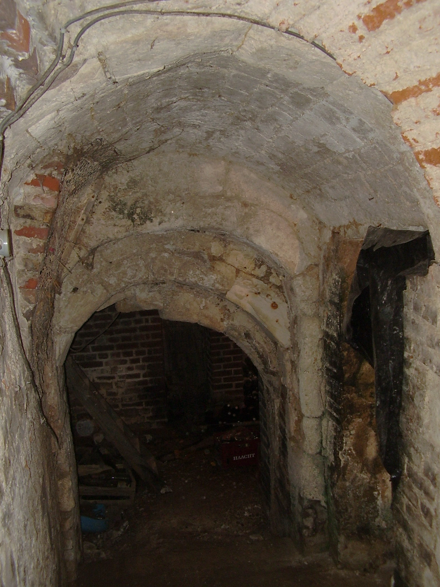 Cette entrée de souterrain était supposée relier la Cour du Bosc à l'Eglise.